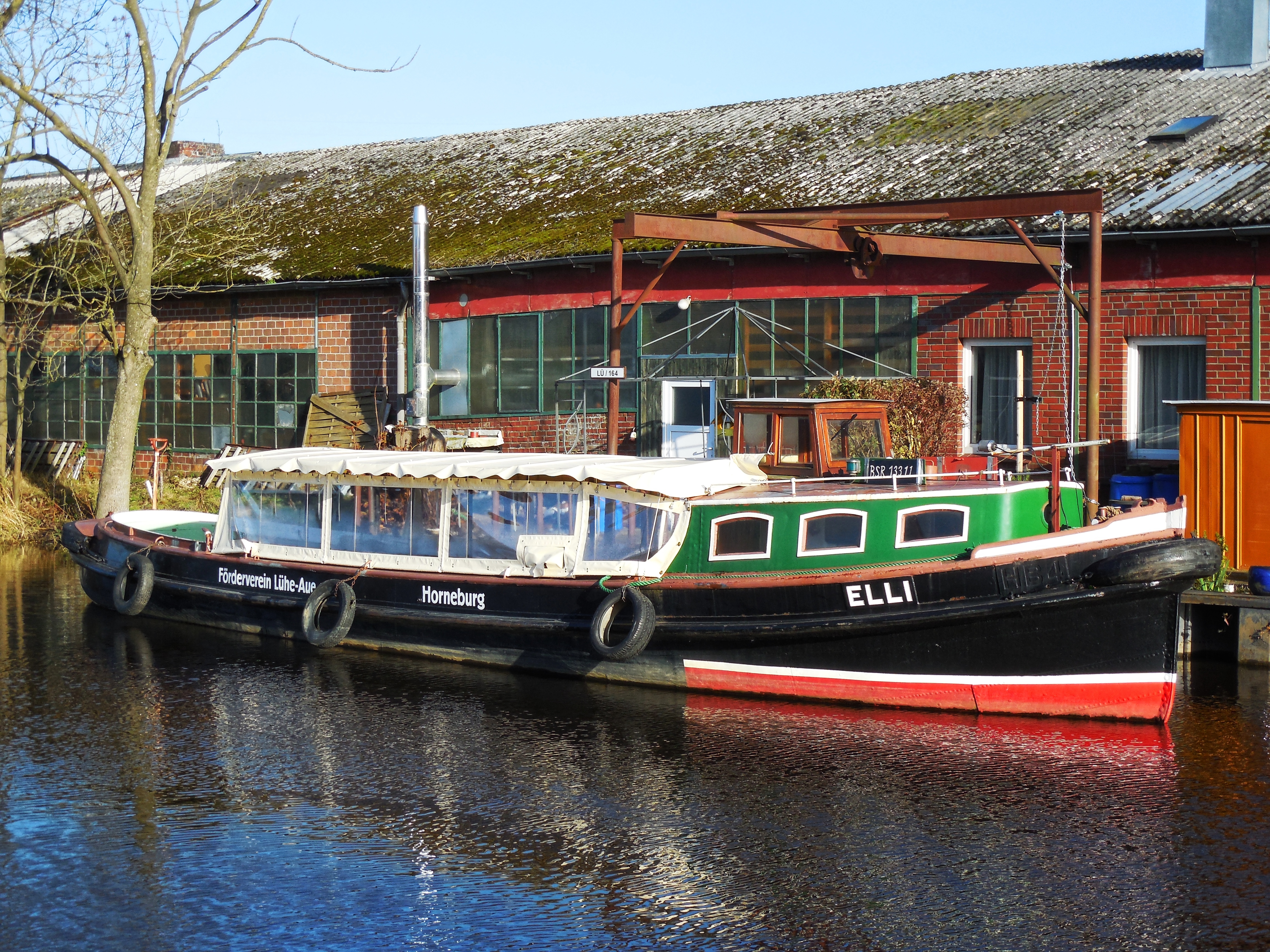 Elli